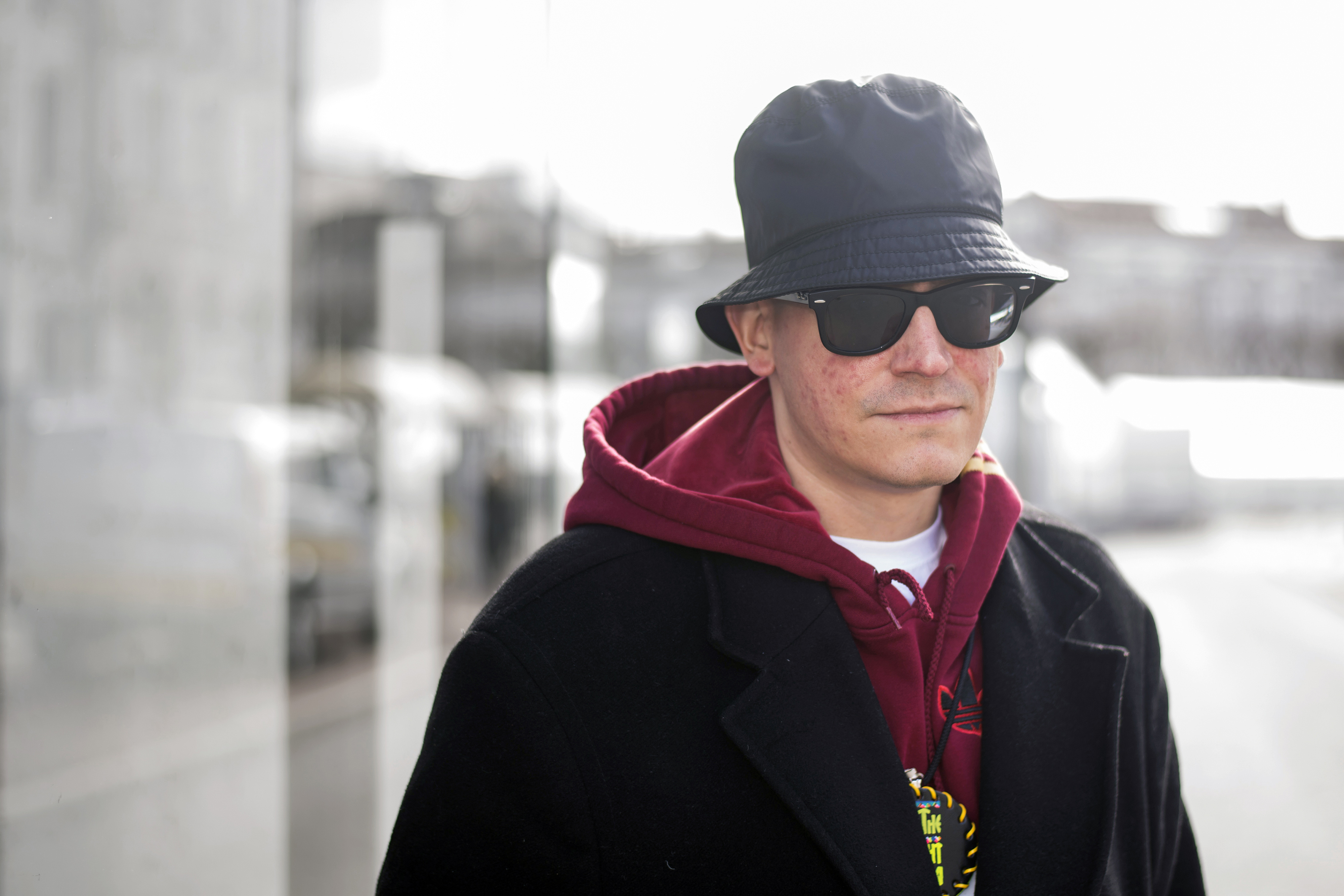 Ed Piskor au Festival d'Angoulême 2017.